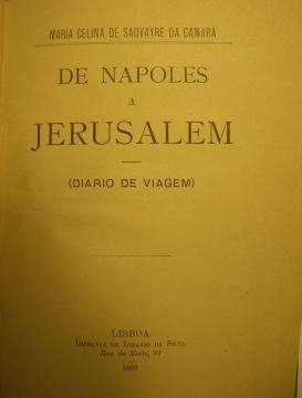 Capa do livro de Maria Celina Sauvayre da Câmara